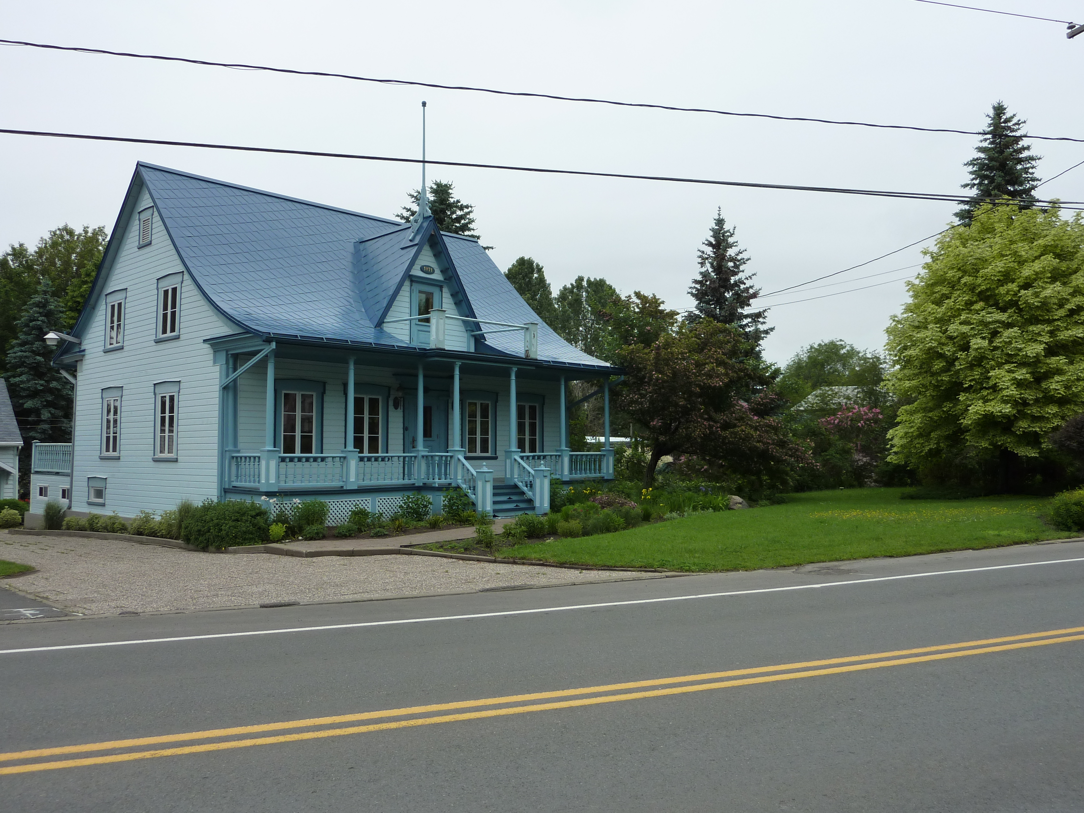 Maison centre du village